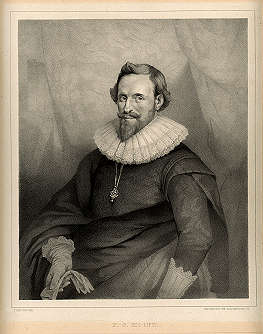 Portret van P.C. Hooft, door F. van Goor.